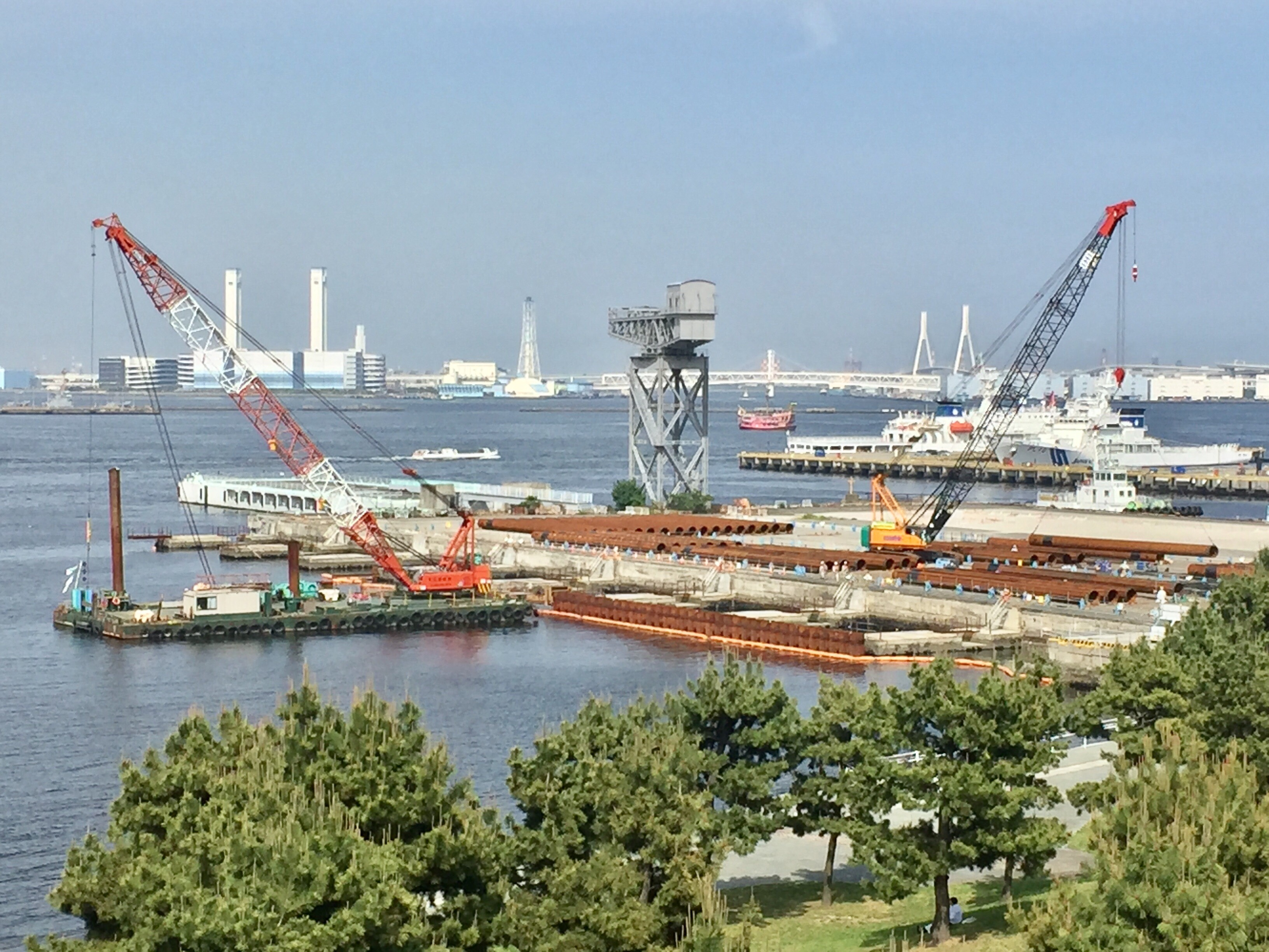 2019年春の新客船ターミナル開業に向けて、現在整備が進められている横浜市・新港埠頭9号岸壁。中央にはハンマーヘッドクレーンの遺構も見える。（カップヌードルミュージアムより2017年5月撮影）